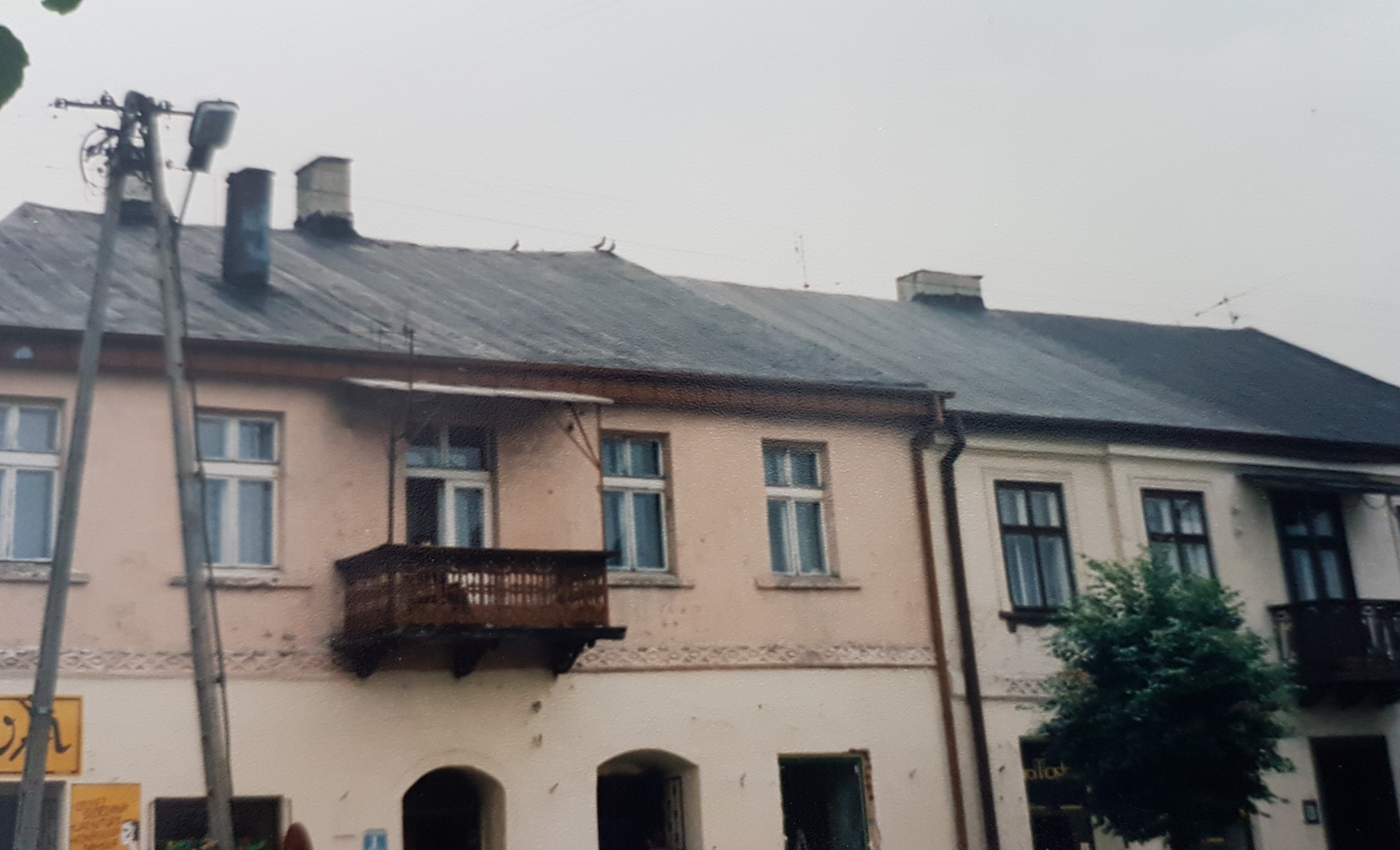 בית משפחת זנדל לאסק